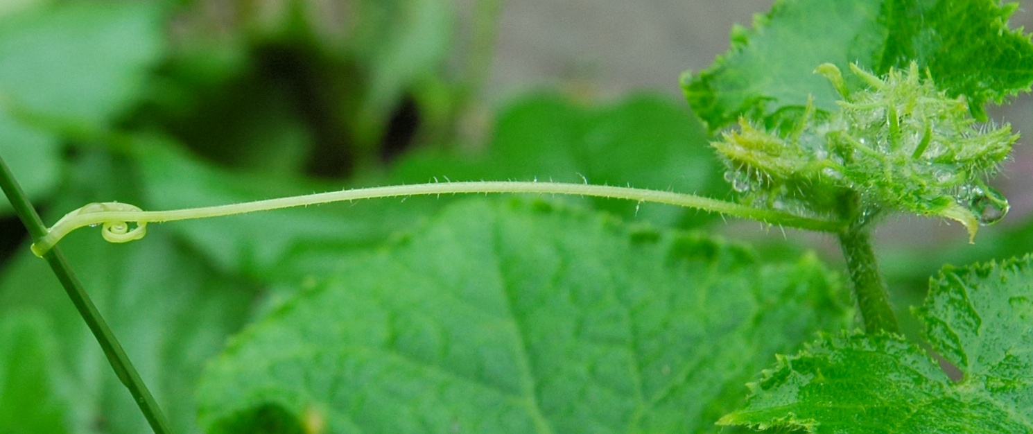 Cucumis sativus (キュウリ)